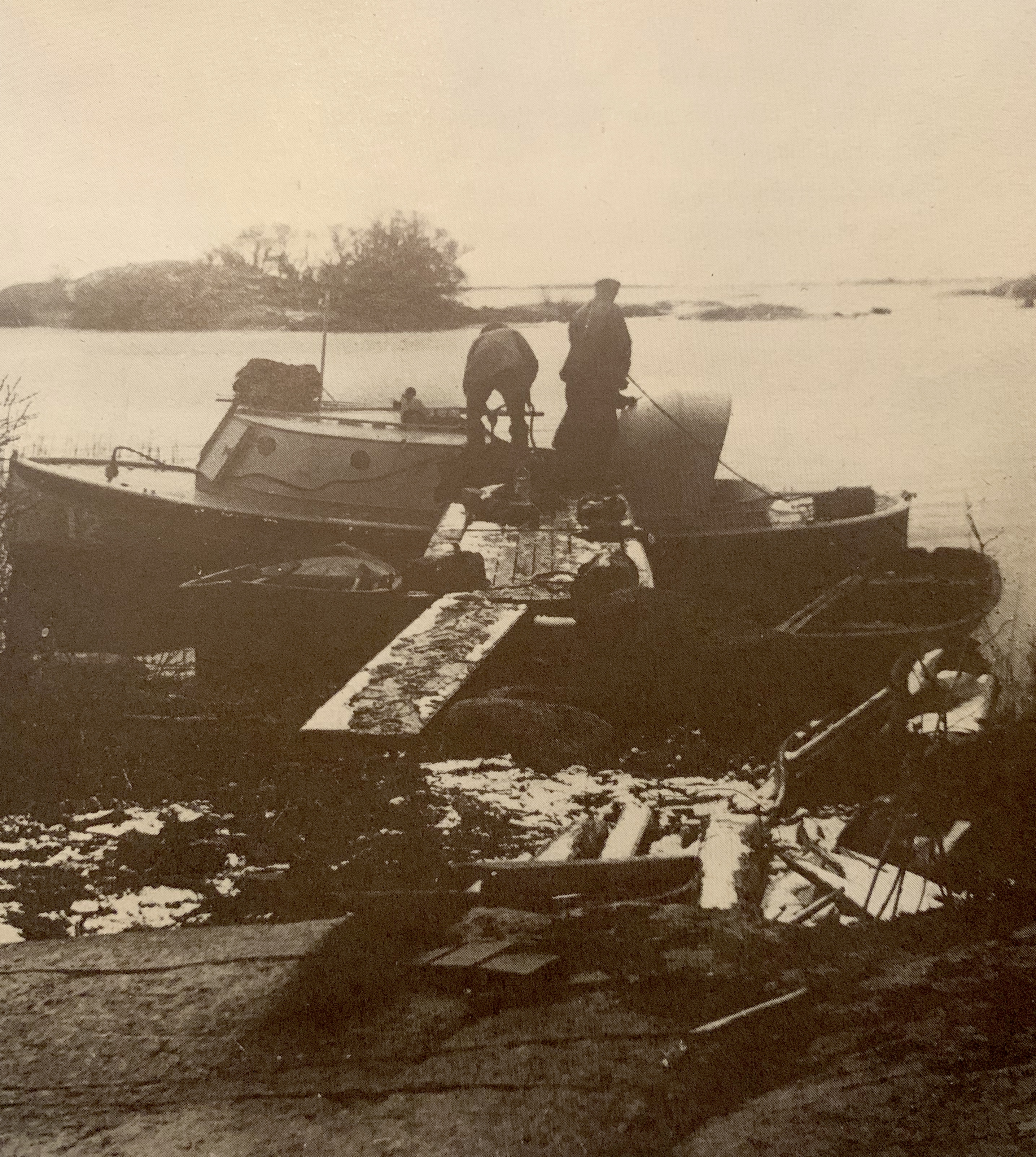 För att undgå misstankar lånade polisen ofta andras båtar.